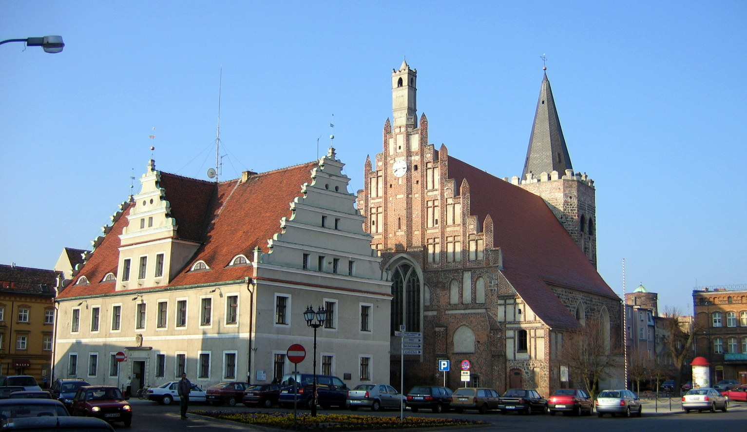 Lubsko, ratusz, 1580